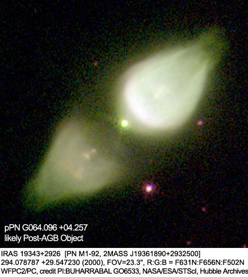 Planetary Nebula M1-92